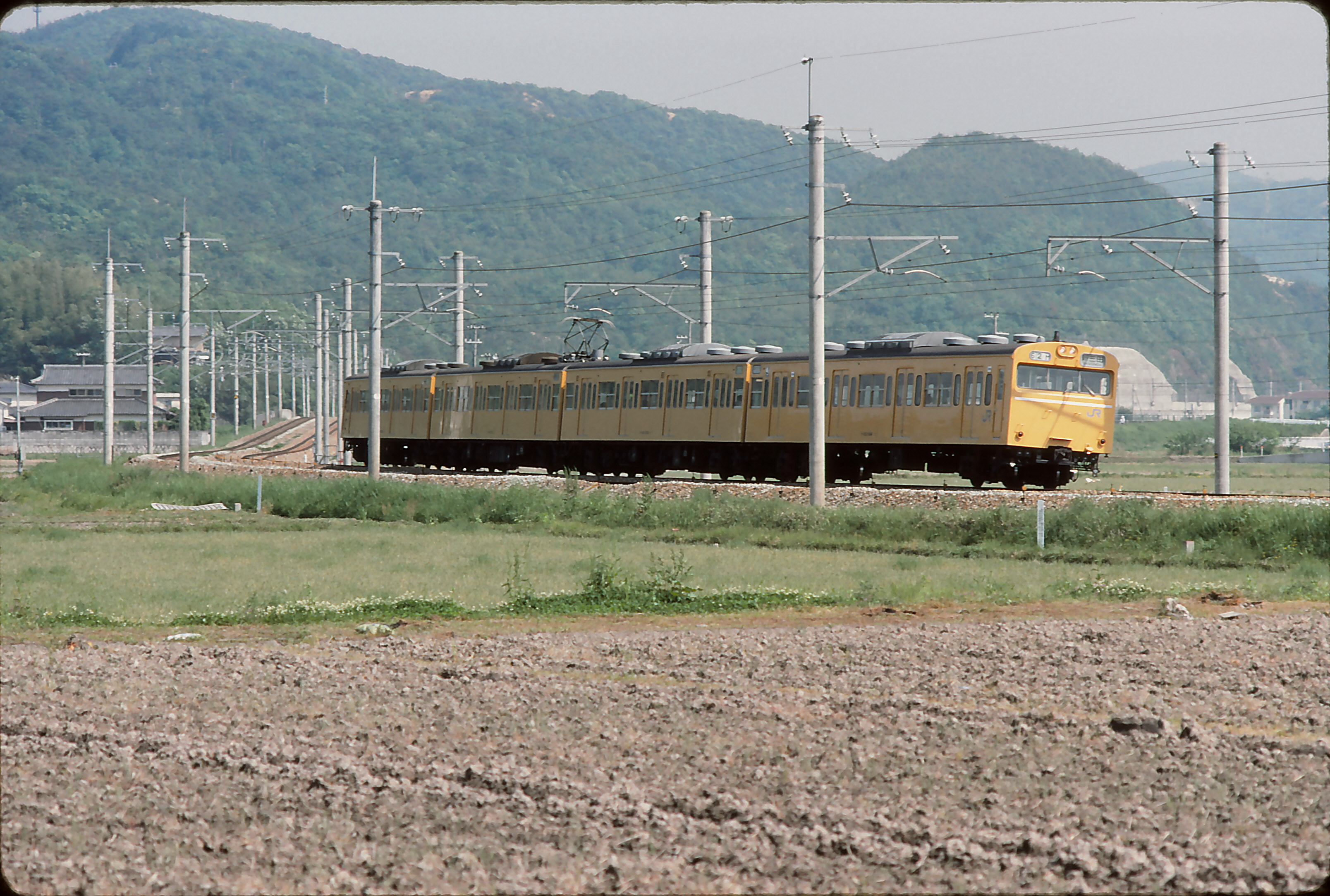 福知山線道場付近